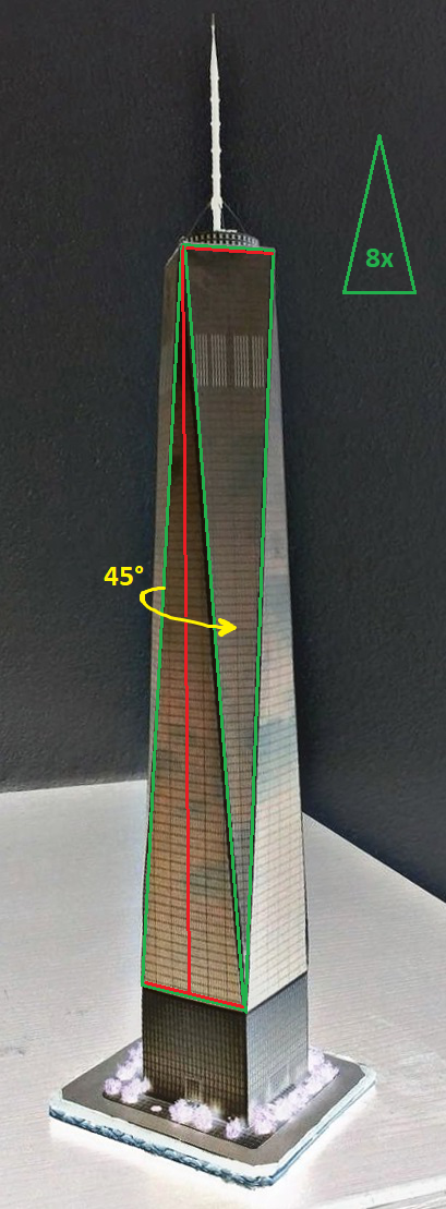 Stavba má čtvercový půdorys, ale směrem nahoru je vůči němu pootočena o 45°. Budova ve tvaru neúplného osmiúhelníku se s rostoucí výškou neustále mění, díky čemuž snadněji absorbuje působení vzdušných proudů a nedojde k poškození skleněného pláště (tzv. regulace obtékání větrem).